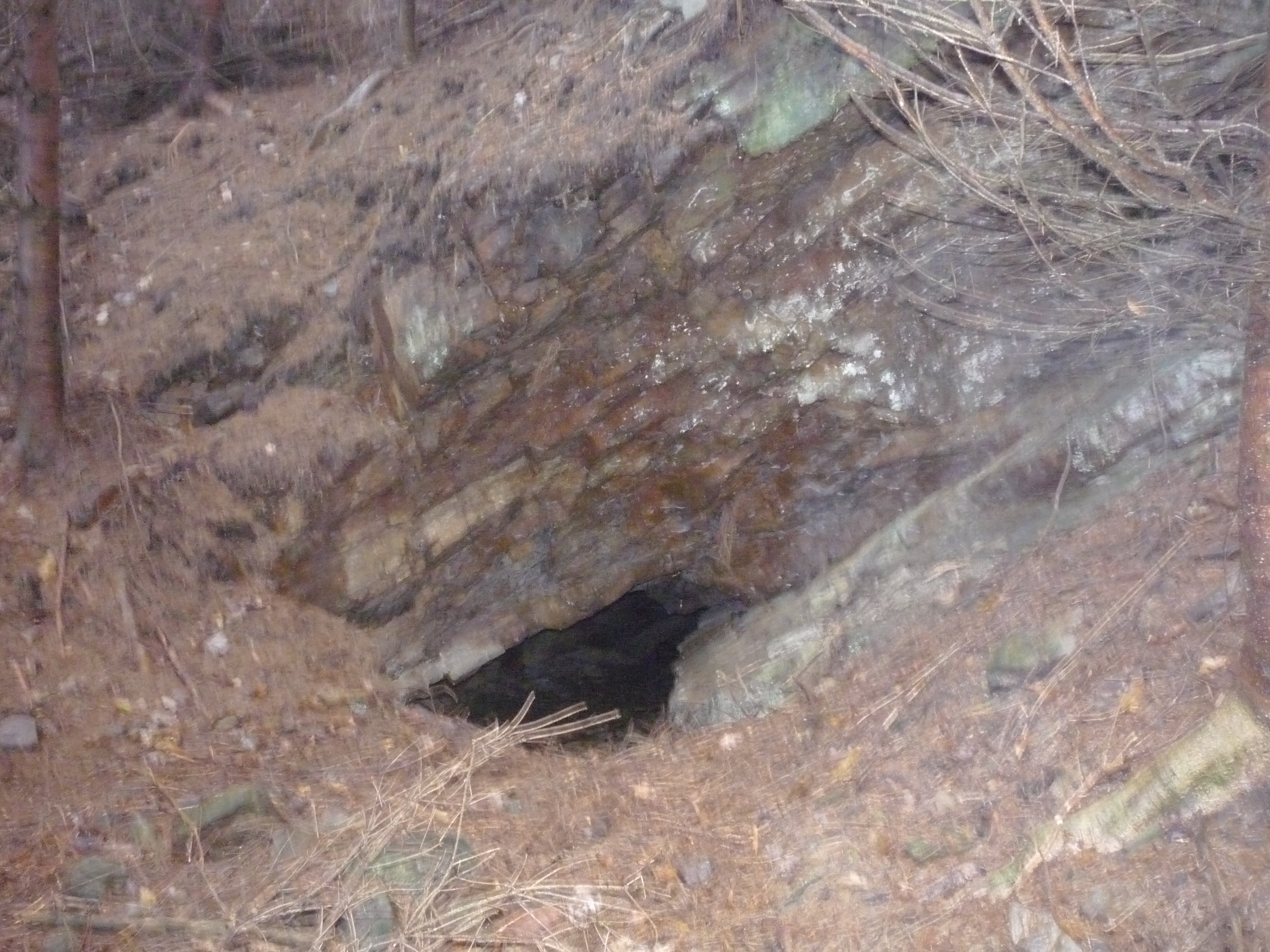 Autor fotografie Jiří Zelenka. Toulky Vysočinou. Pohled okr. Havlíčkův Brod